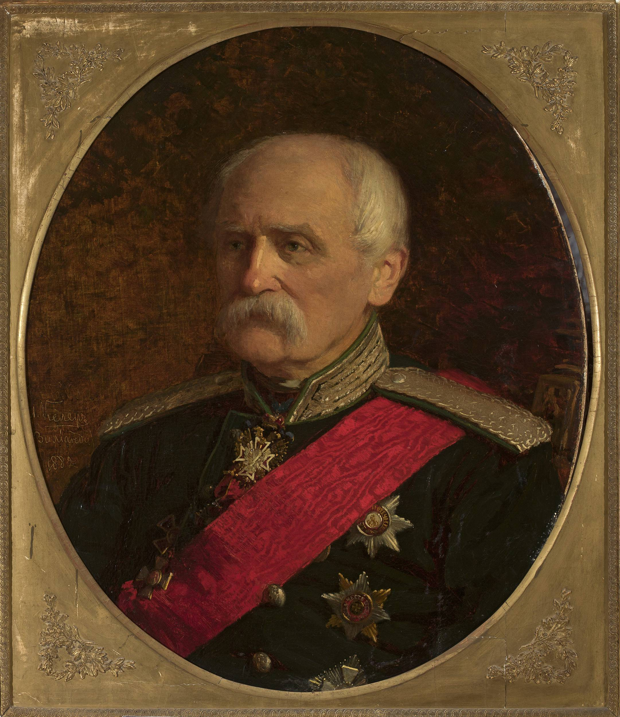 Johann Köler. Portret generała majora inż. Stanisława Kierbedzia. 1882. Muzeum Narodowe w Warszawie.